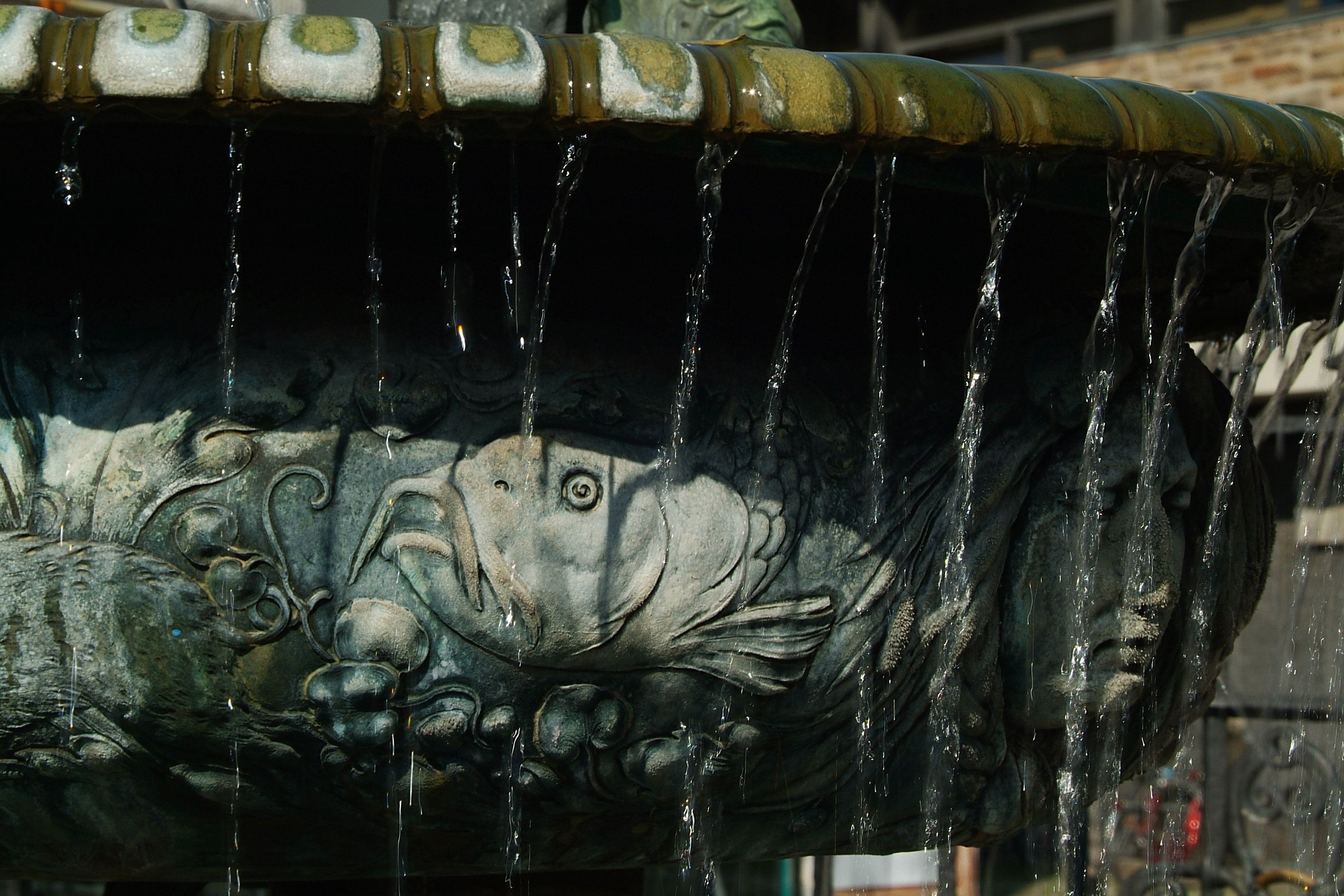 Details an einer der Schalen am Holzmarktbrunnen mit Fisch und Frauenkopf.